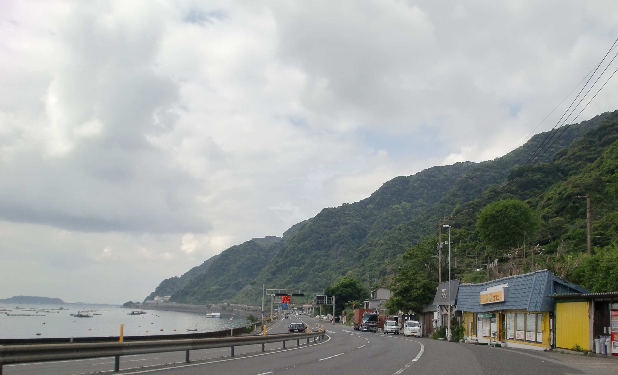 鹿児島県鹿児島市吉野町の竜ヶ水駅付近を通る国道10号を姶良方面から鹿児島市街方面へ望む